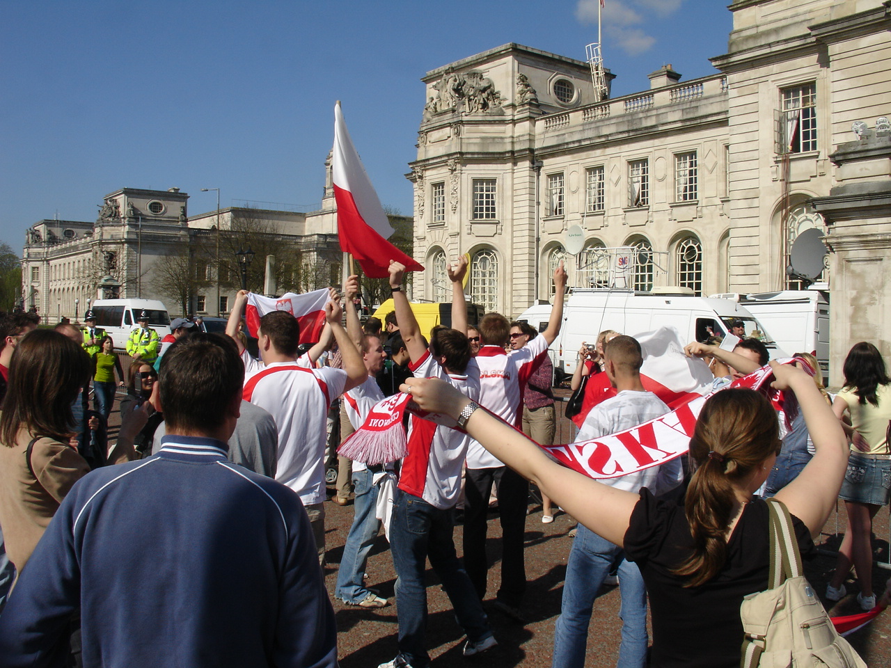 Radość Polaków przed ratuszem w Cardiff po wyborze Polski i Ukrainy na gospodarzy Mistrzostw Europy w Piłce Nożnej 2012 Joy of Poles in front of City Hall in Cardiff, after choosing Poland and Ukraine as hosts for ME2012